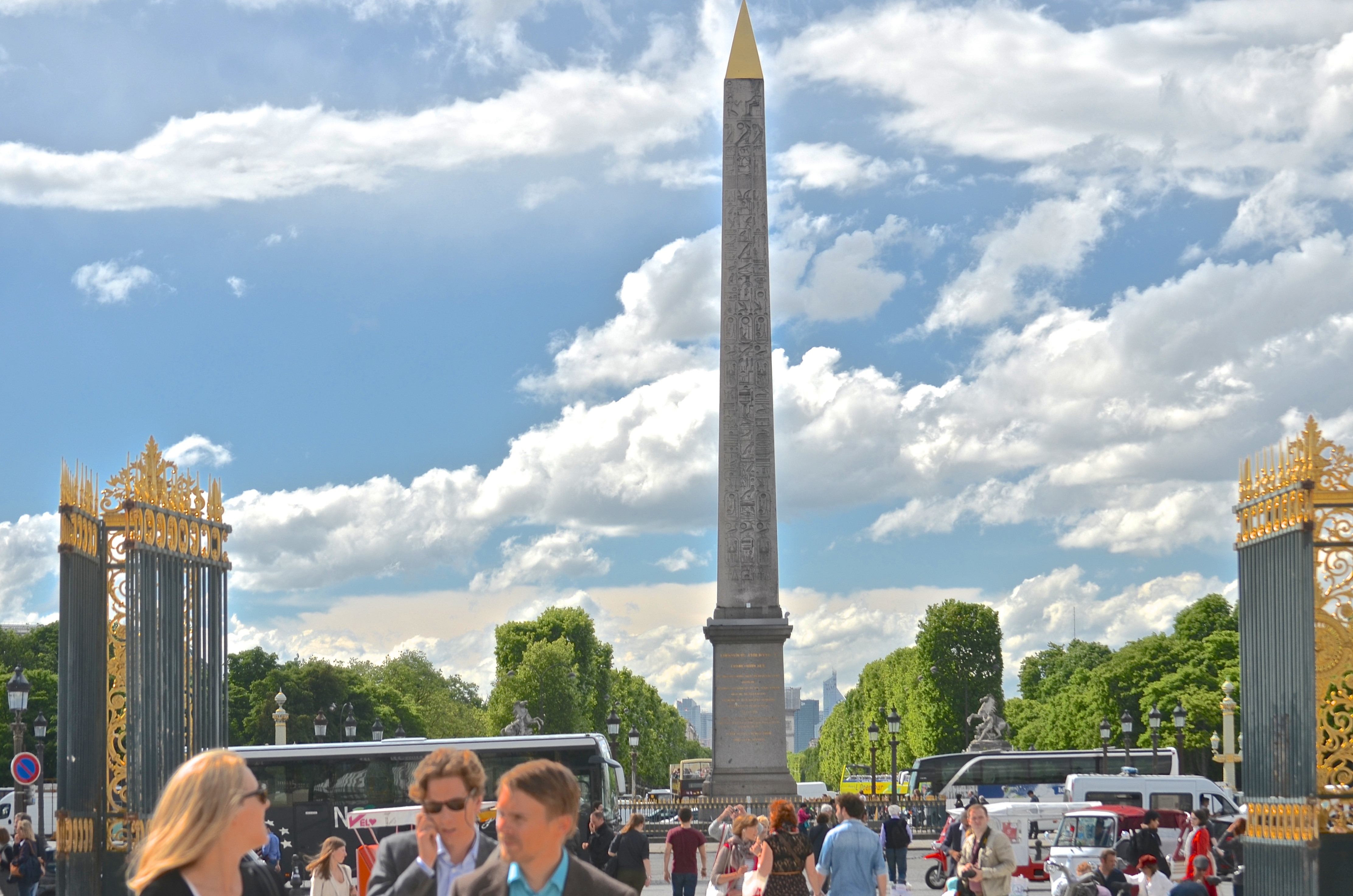 Egyptian Obelisk, Paris.